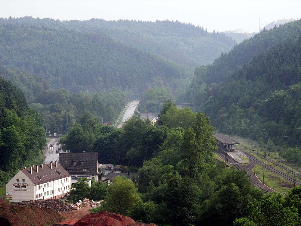 Biebermühle. Ansicht aus Norden vom Steinenschloss. Zu erkennen: rechts der Bahnhof Pirmasens-Nord. Rechts oben das Müllheizkraftwerk in Pirmasens, daneben die Firma Kömmerling. Mittig verläuft die Bundesstrasse 270. Links der Kreuzungsbereich B 270/L 497 nach Rodalben.